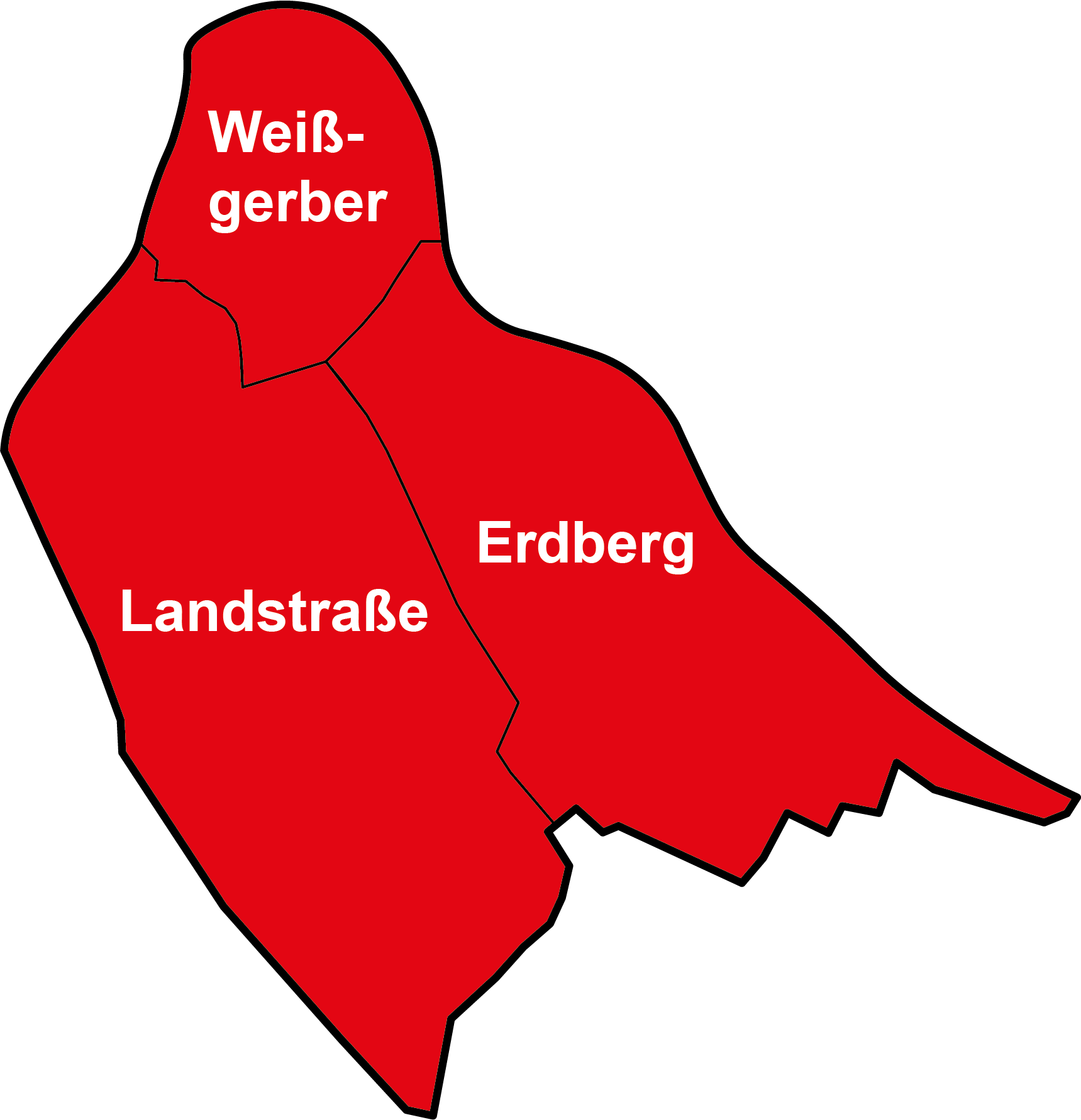 Bezirksteile der Landstraße